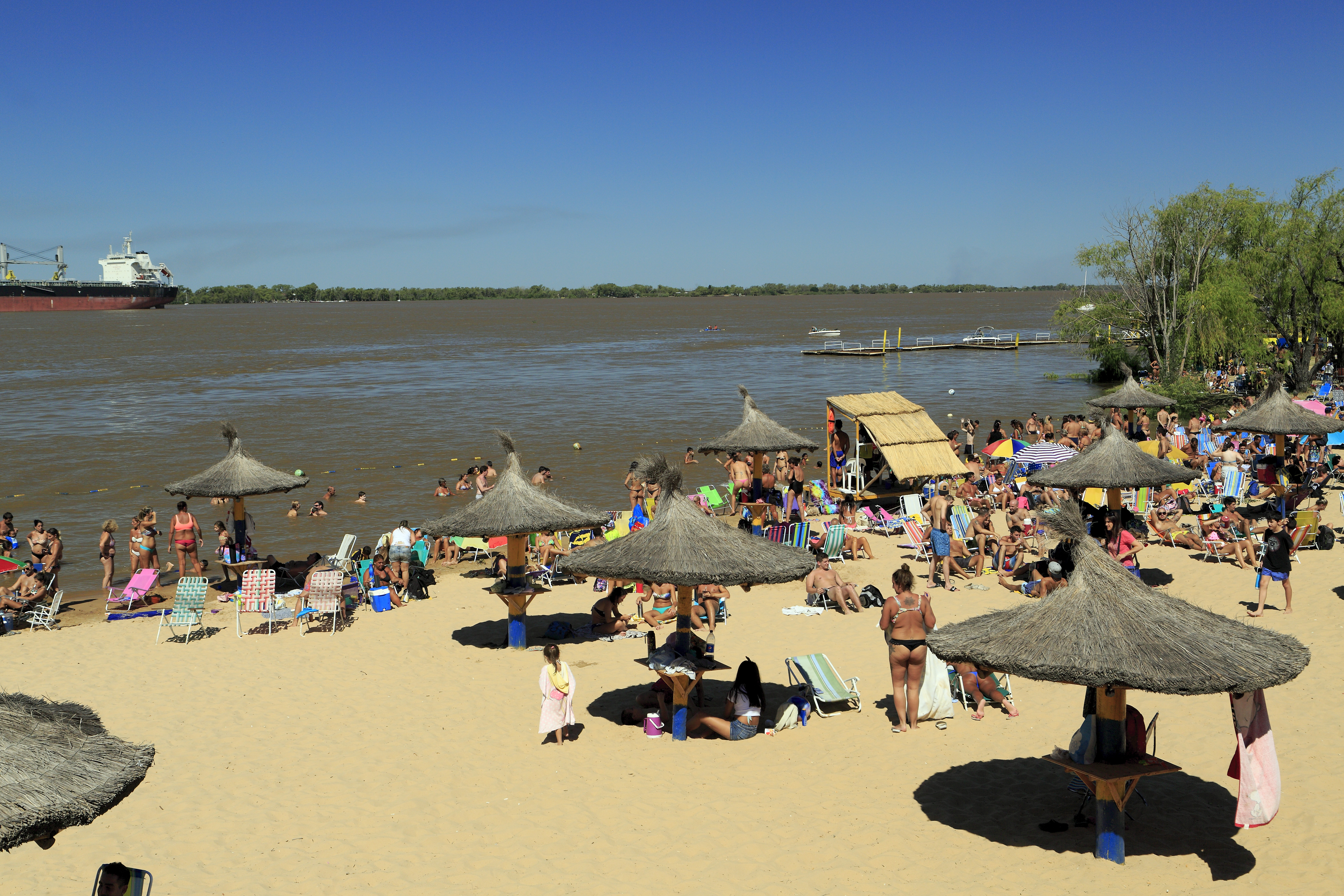 Das Wasser ist zwar durch die Sedimentfracht braun, zum Baden ist es jedoch sauber genug. Es ist allerdings ausgesprochen warm und nicht unbedingt erfrischend.